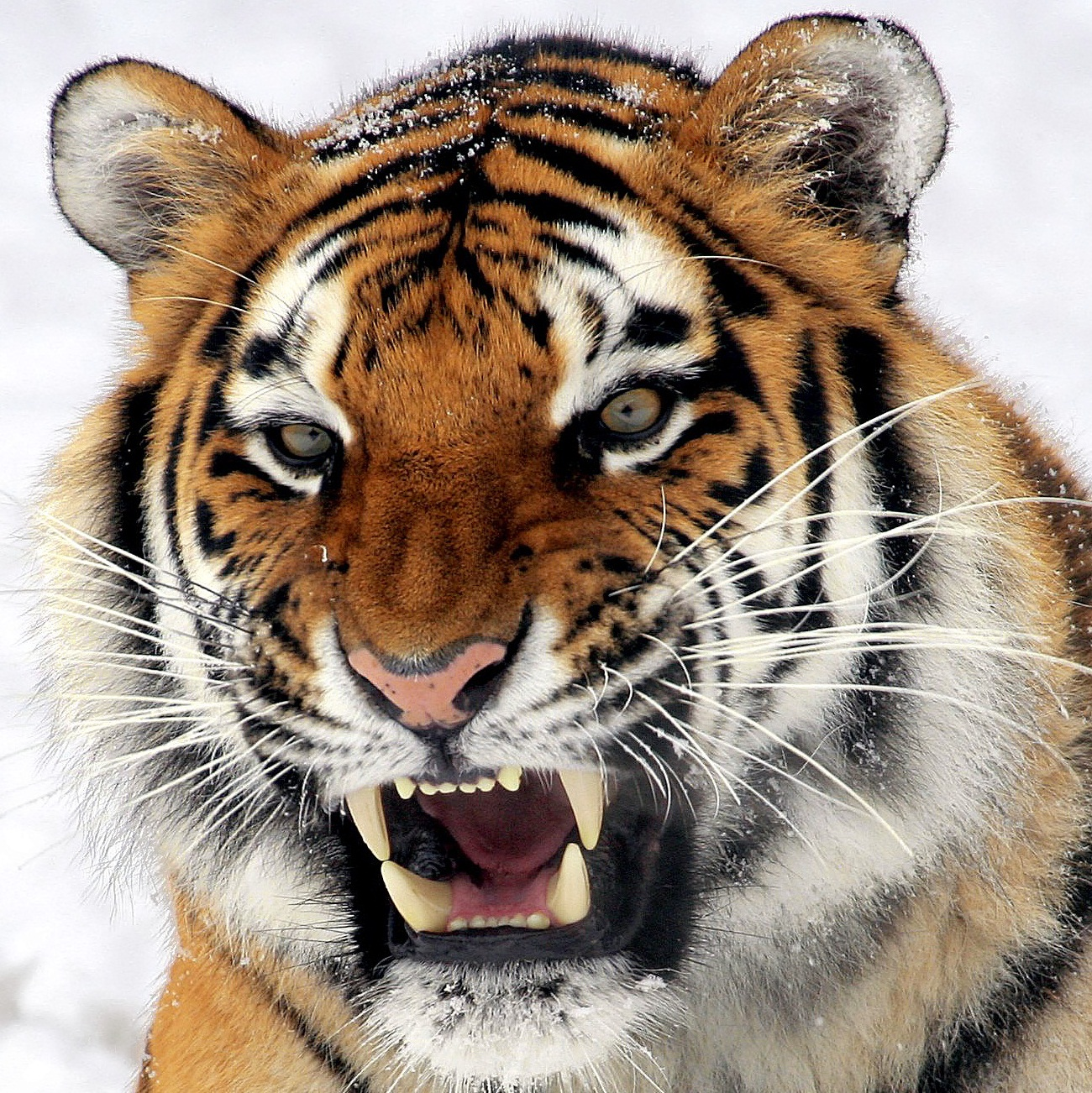 Hình chụp và chỉnh sửa lại của một tấm hình tại WikiComons